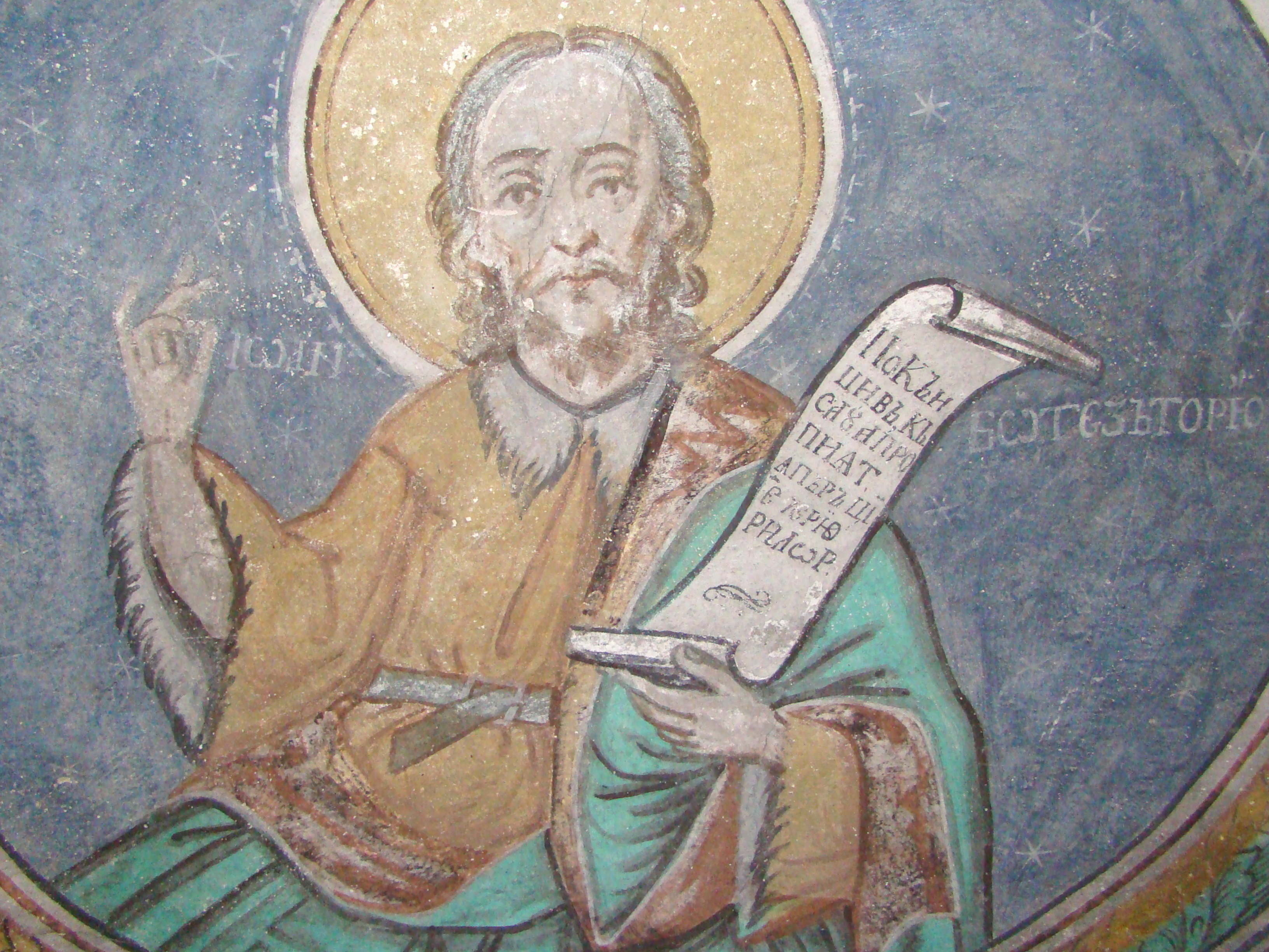 Biserica „Sf. Dumitru”, sat Poieni; comuna Vidra